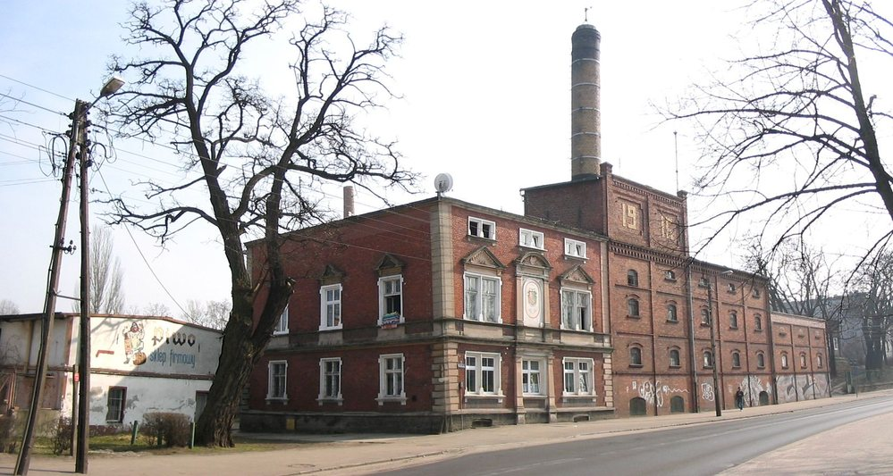 Nowa Sól, ul. Wrocławska 21 - browar, mur., 1880, 1896, 1904, 1916. Obecnie nieczynny, obok - przybrowarniana knajpka i sklep. autor:Mohylek